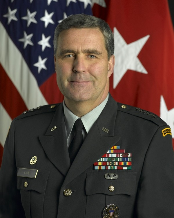 Lieutenant General Douglas E. Lute, USA.